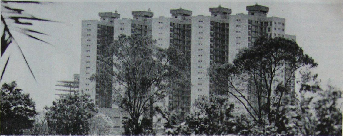 Vista del Conjunto Habitacional de Avenida Brasil y Matheu (conocido como "Las Torres de Matheu). Arquitectos: Miguel Roca y R. Fernández Llanos. Buenos Aires, Argentina.